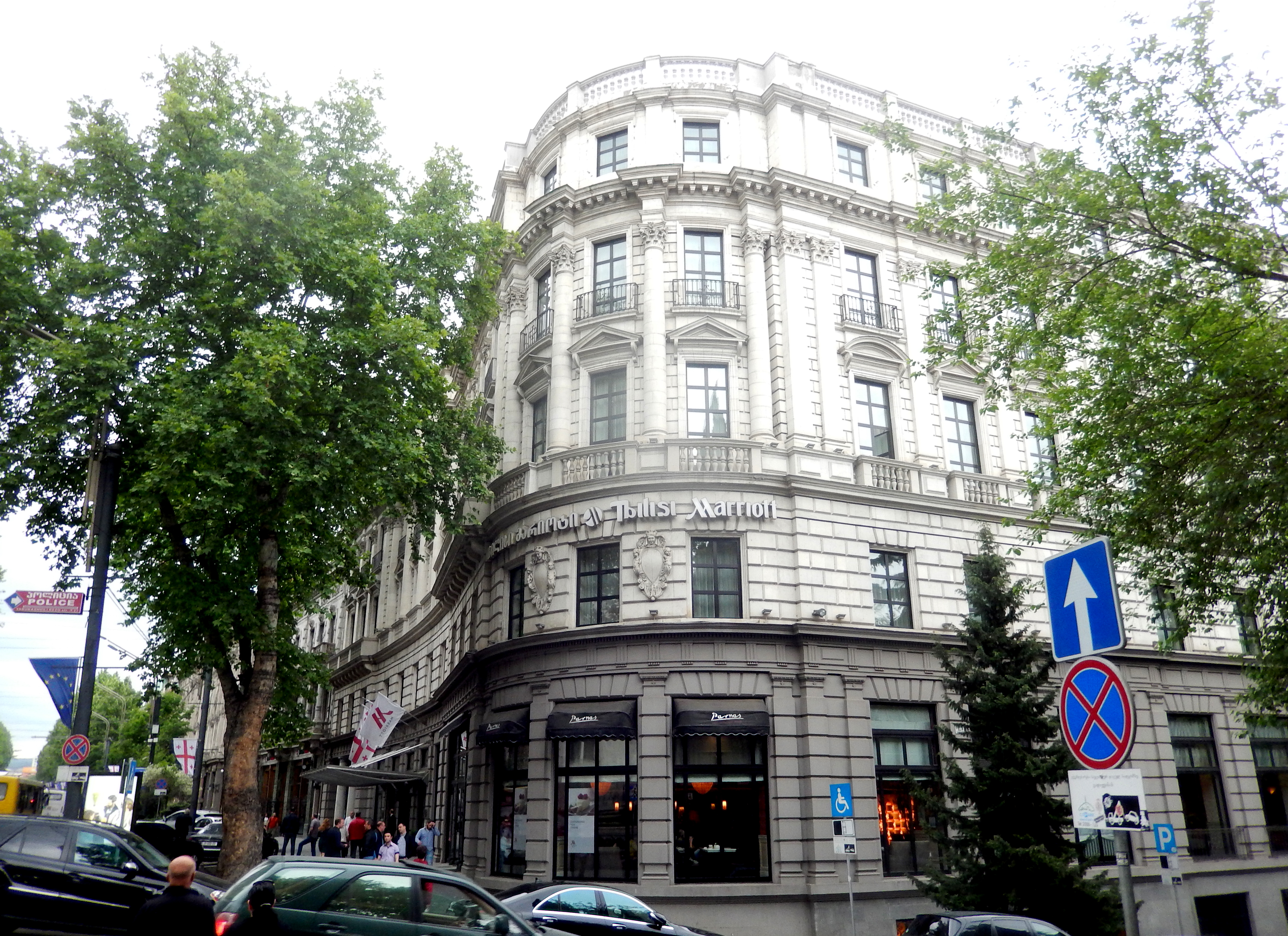 სასტუმრო „მარიოტი“